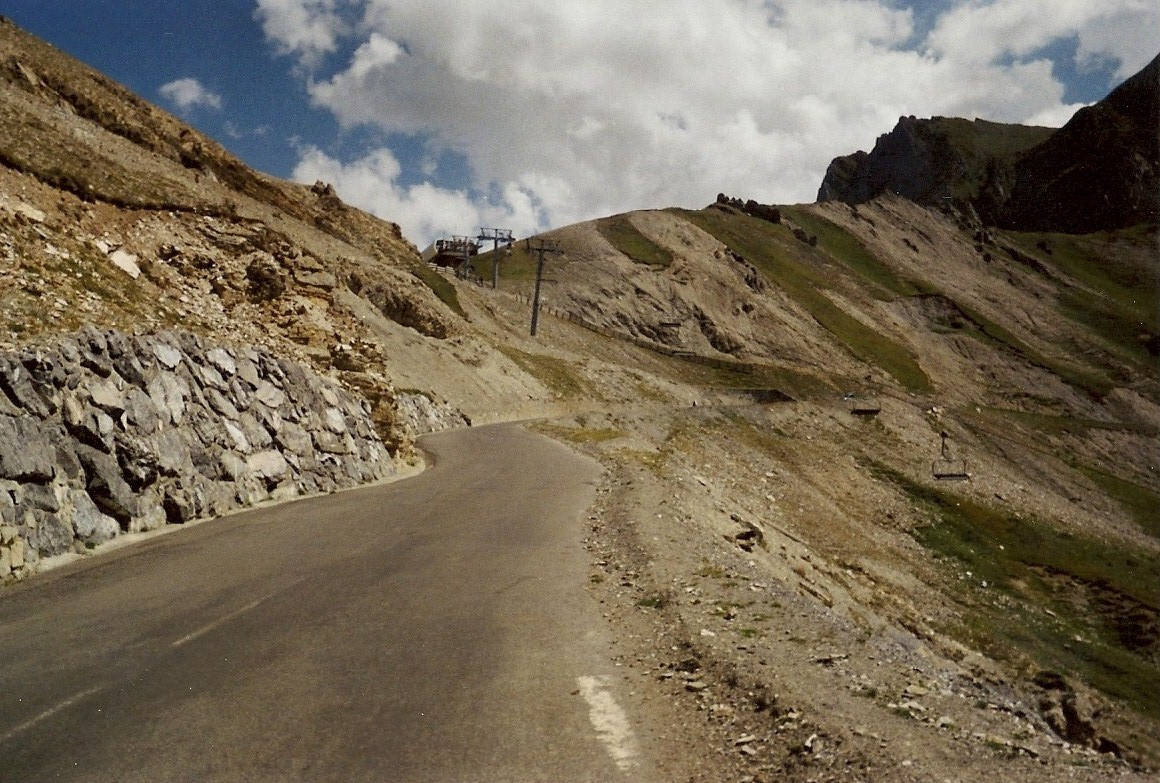 Dernier km